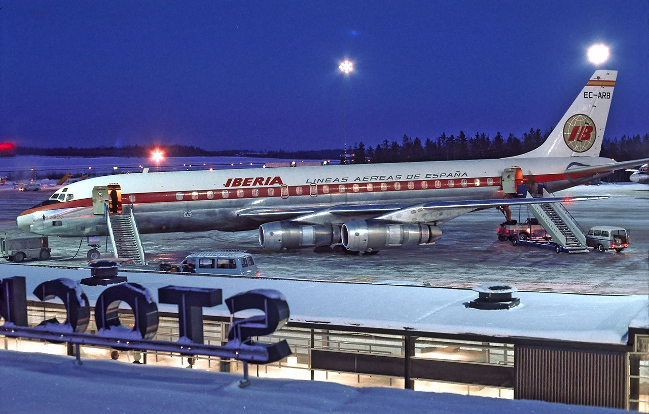 EC-ARB (cn 45618/138) "El Greco" Stockholm - Arlanda (ARN / ESSA) Sweden, December 1969